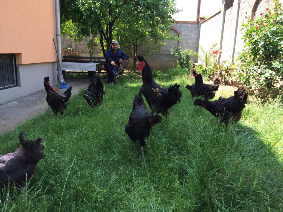 Sandschak Kräher Stamm